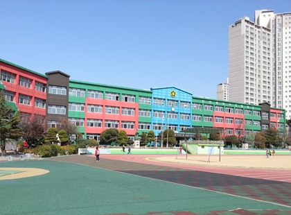 인천부개서초등학교